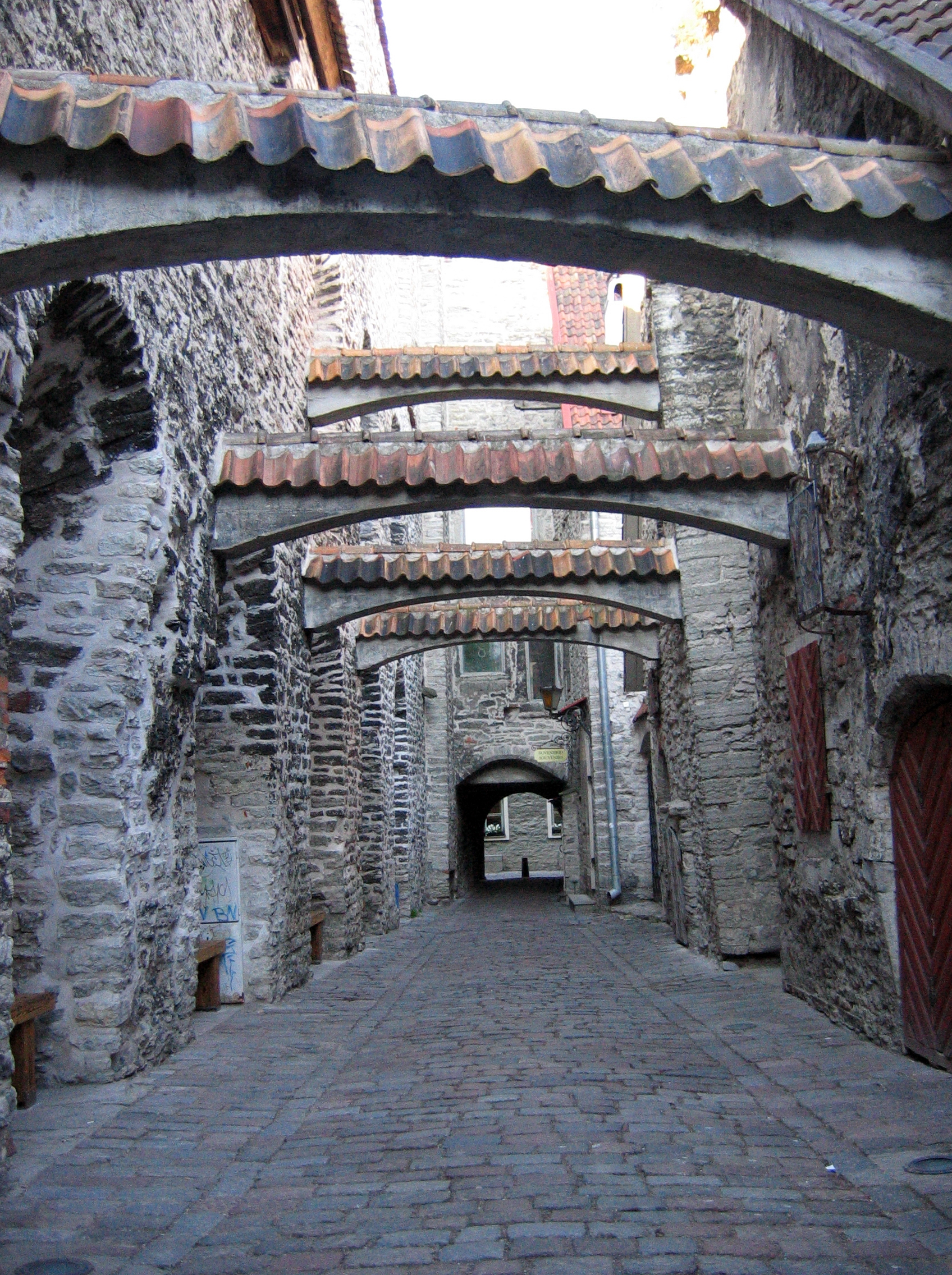 Tallinn Sommer 2007